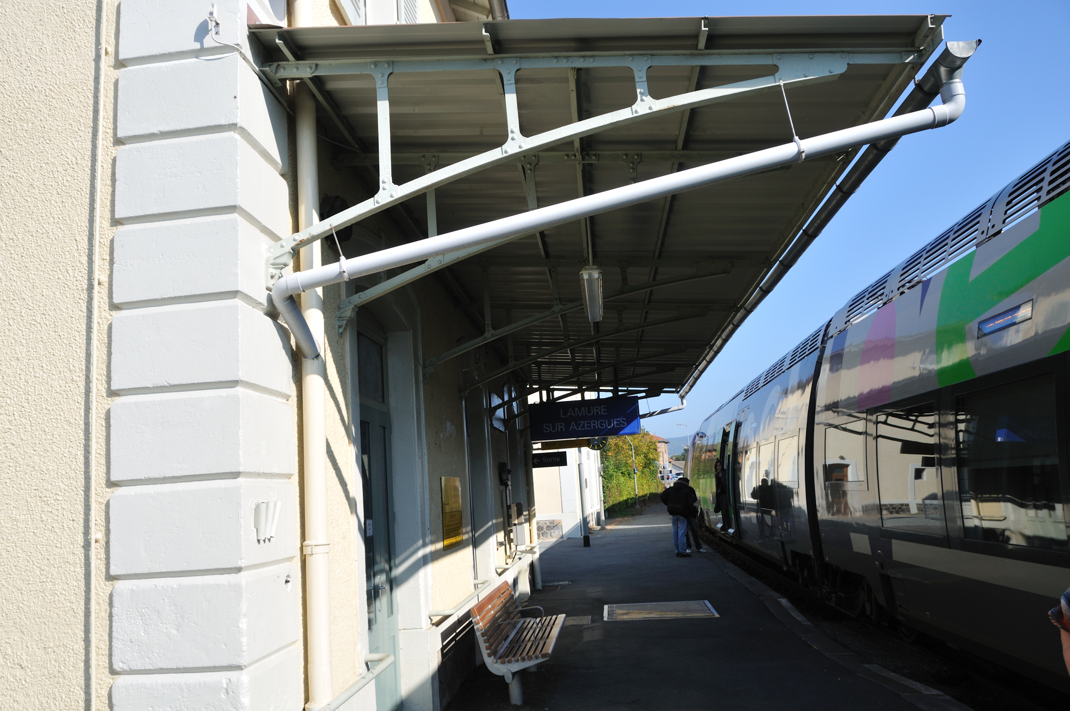 Gare de Lamure-sur-Azergues, Rhône, France